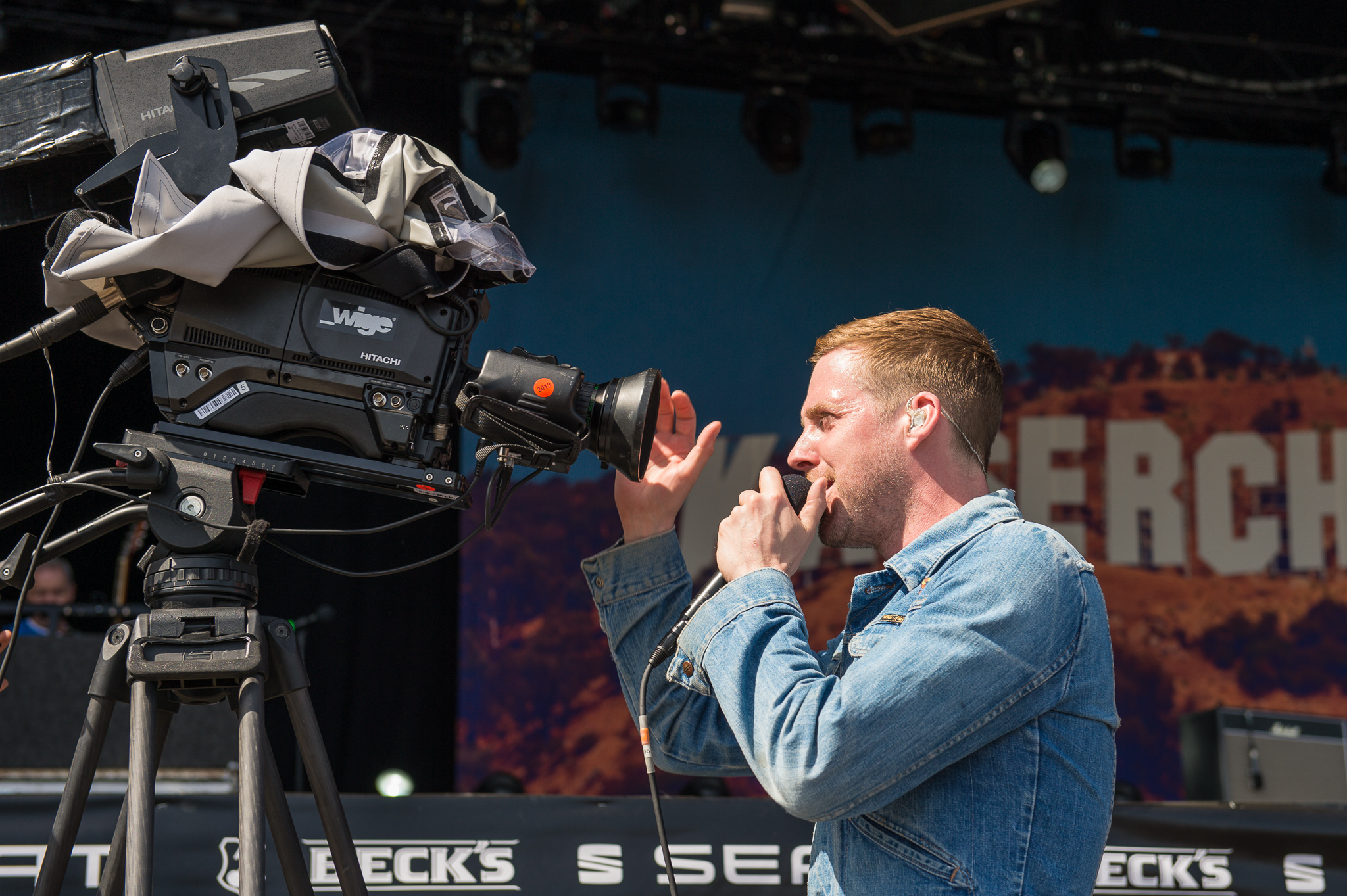 ARGO-Konzerte,Centerstage,Kaiser Chiefs,Konzert,Livekonzert,Livemusik,Musik,RiP,Ricky Wilson,Rock im Park 2014